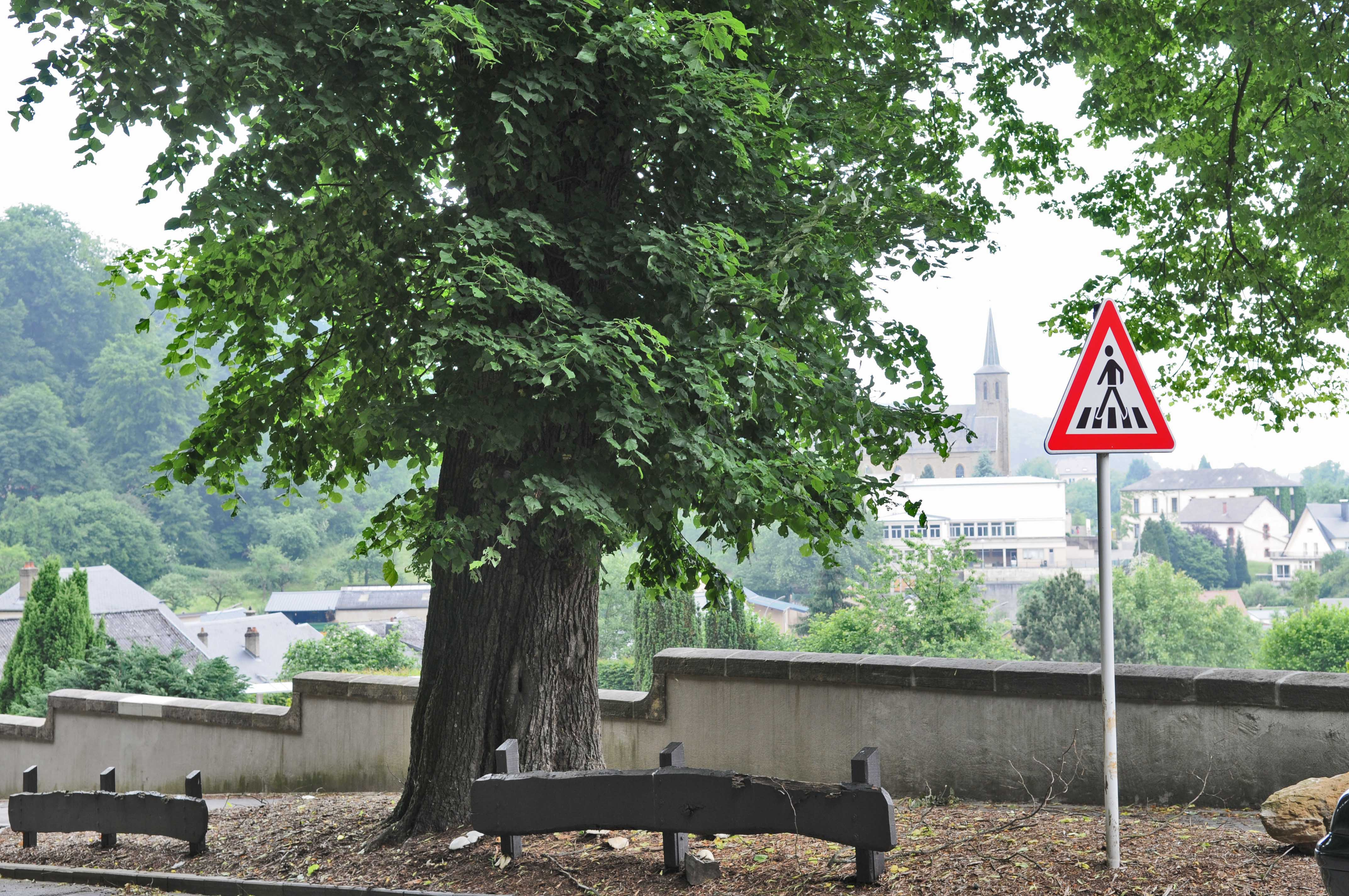 Lann zu Hueschtert.